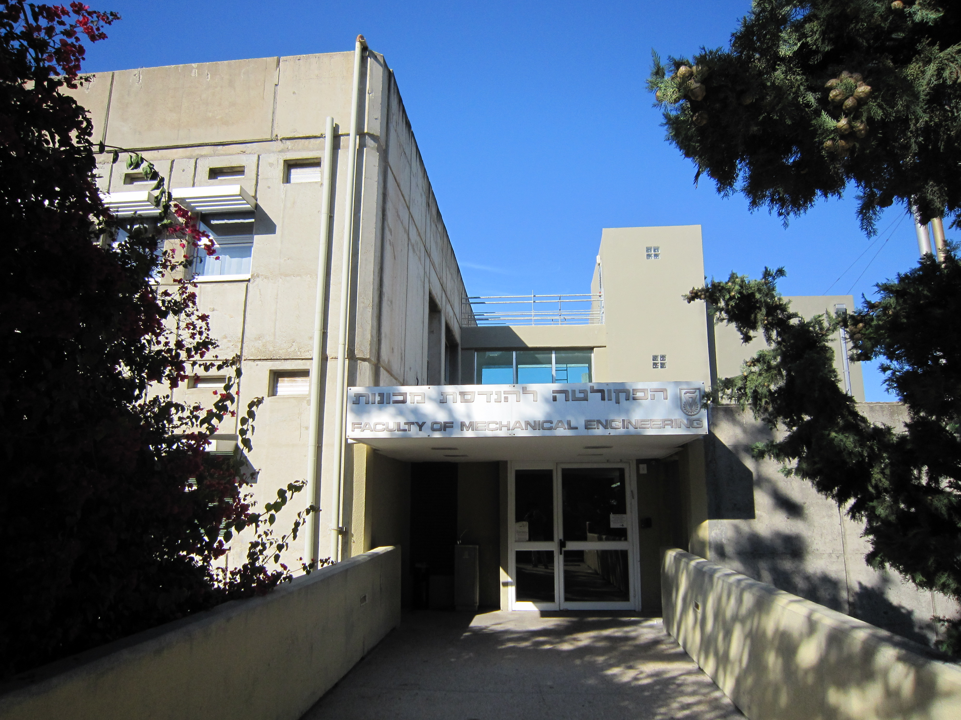 בניין הפקולטה להנדסת מכונות בטכניון